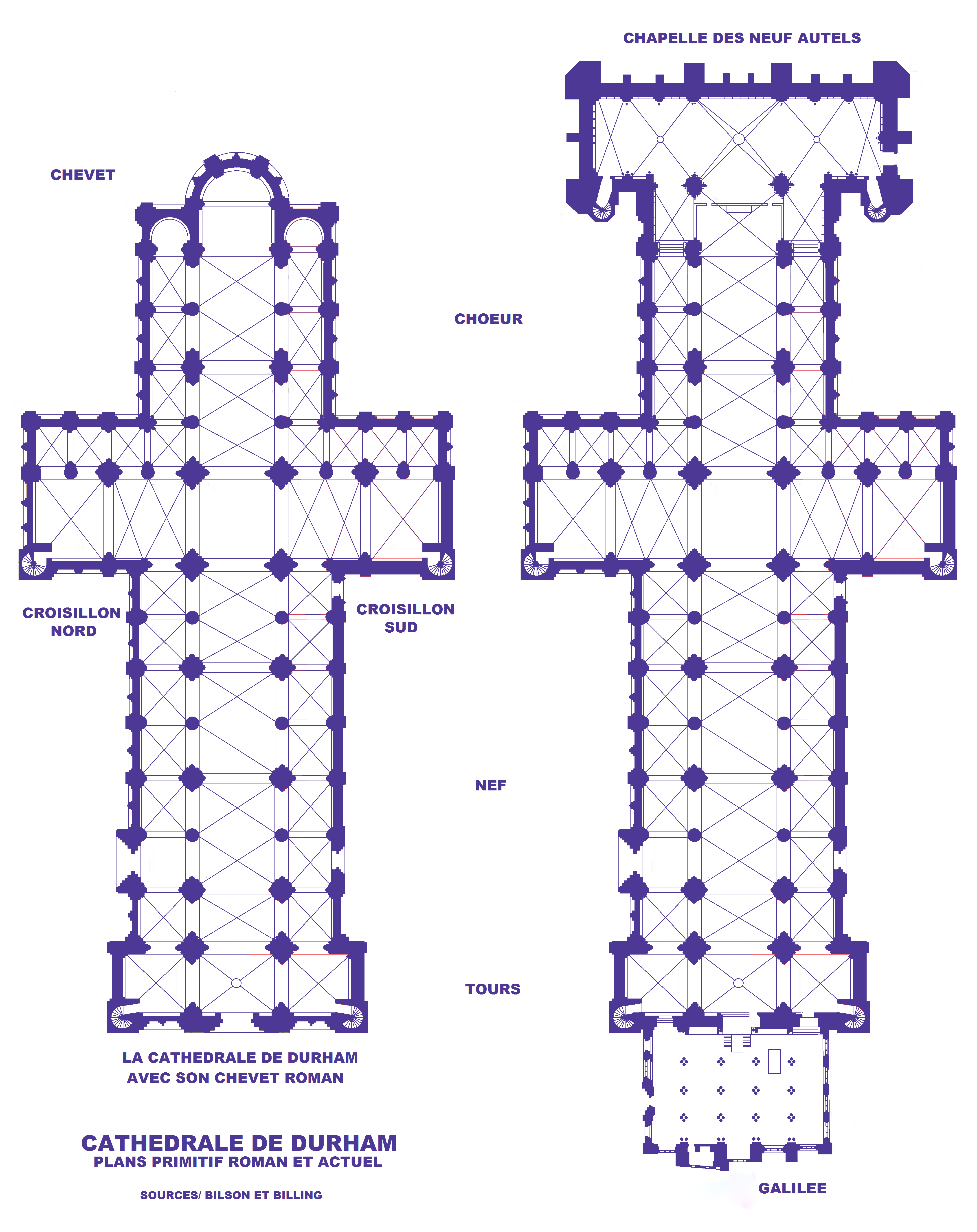 Cathédrale de Durham, Plans primitif roman et actuel